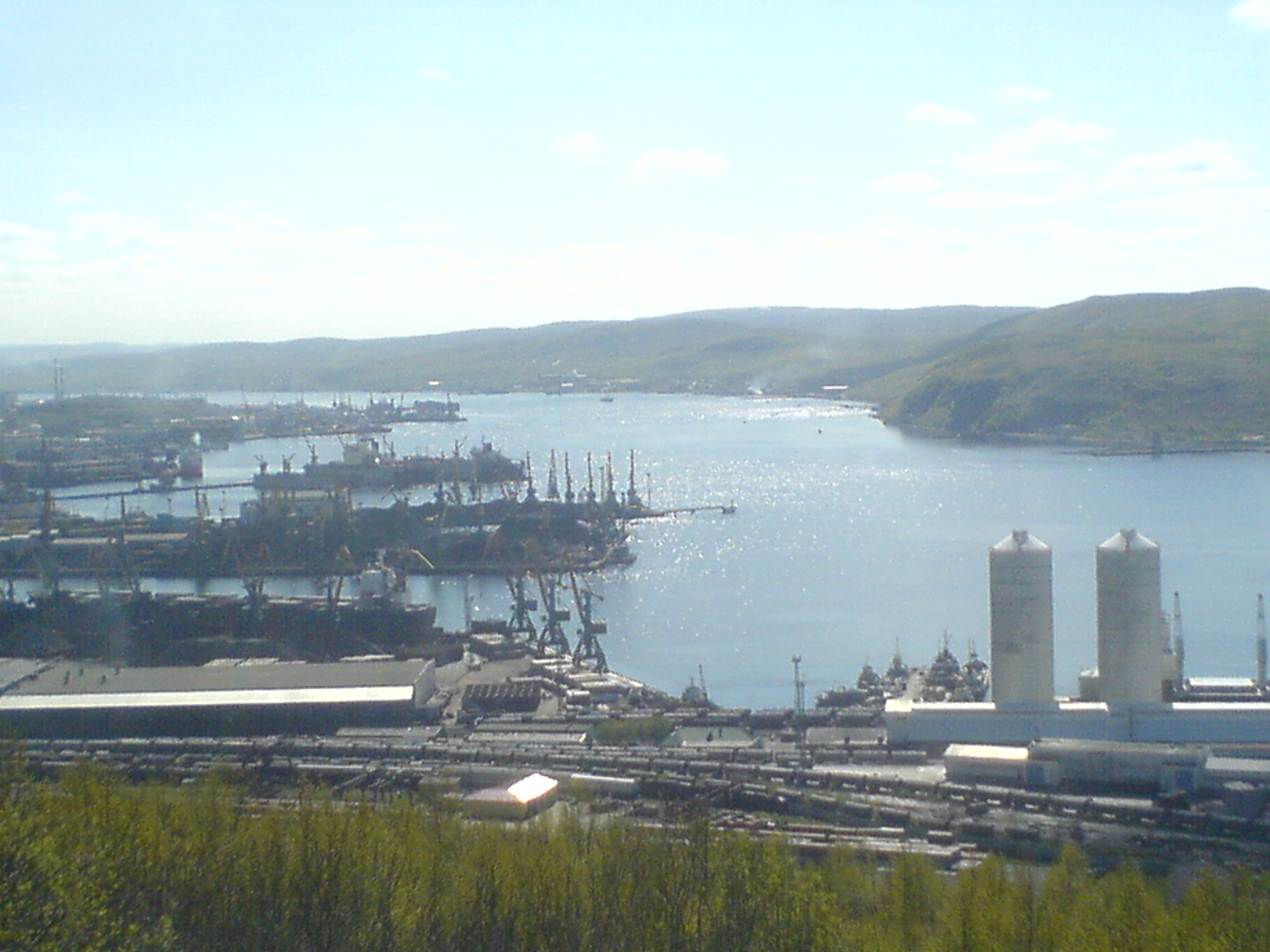 Вид на мурманский порт с холма (Май. 3 часа ночи)